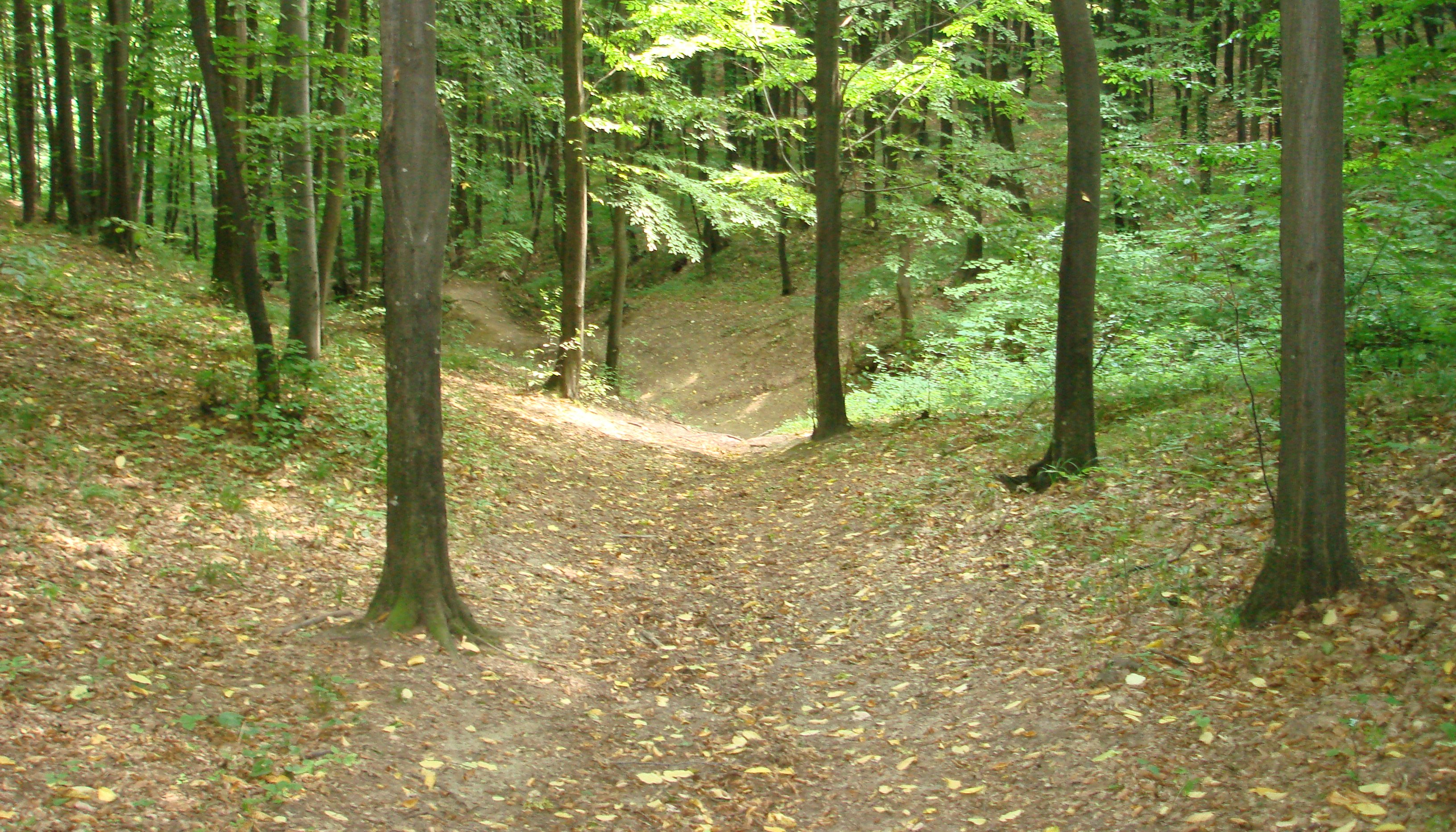 Почва в Кодрах, Страшенский район, Молдавия